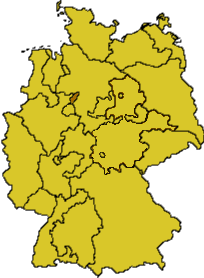 selbst erstellt, GNU-FDL